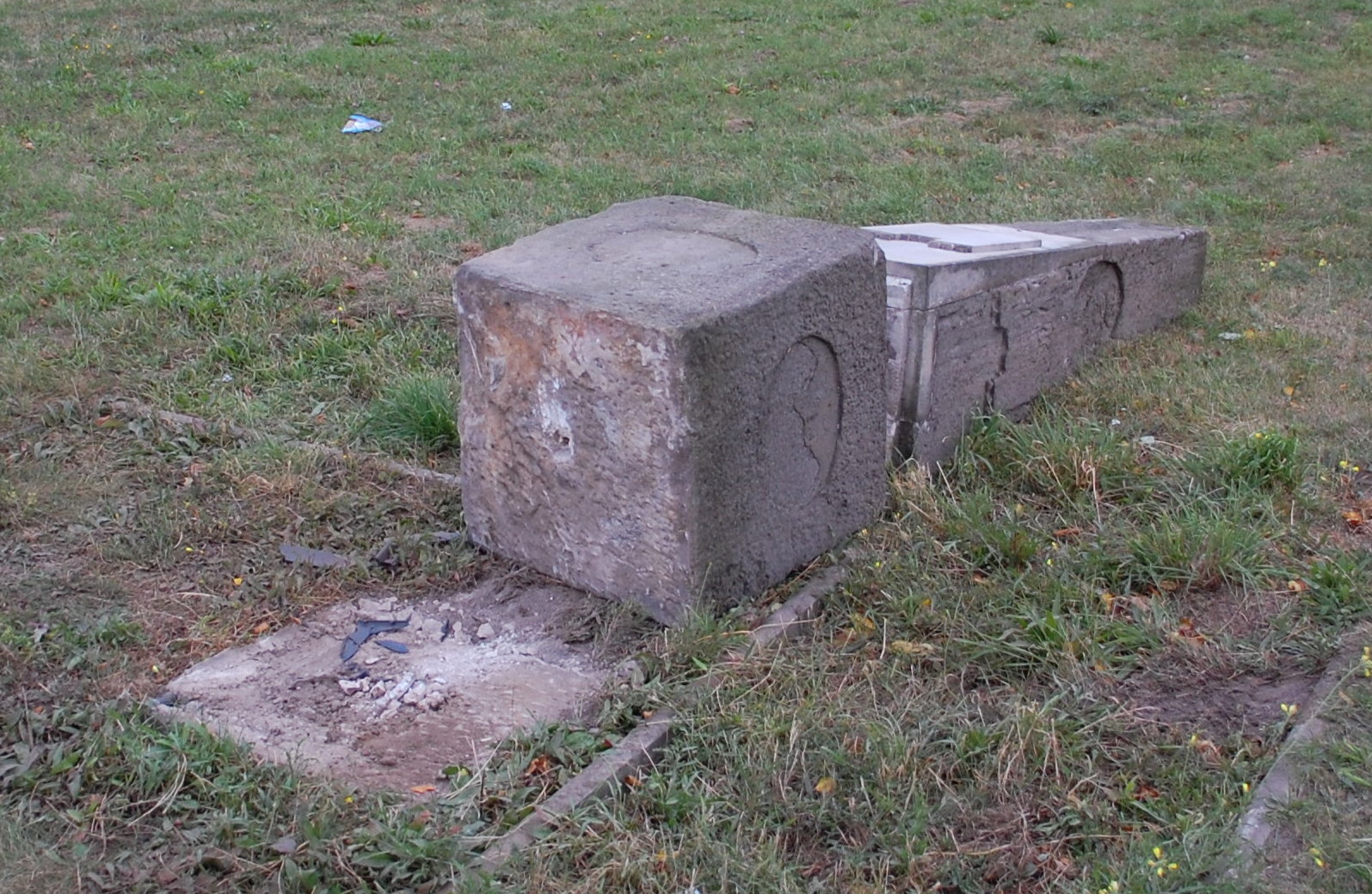 Preußische Ganzmeilensäule Magdeburg umgestürzt